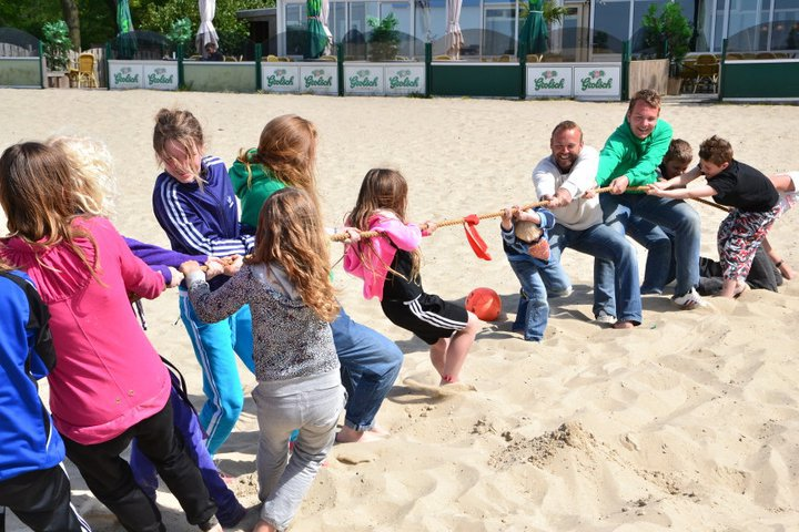 Animatiewerk - touwtrekken op vakantiepark